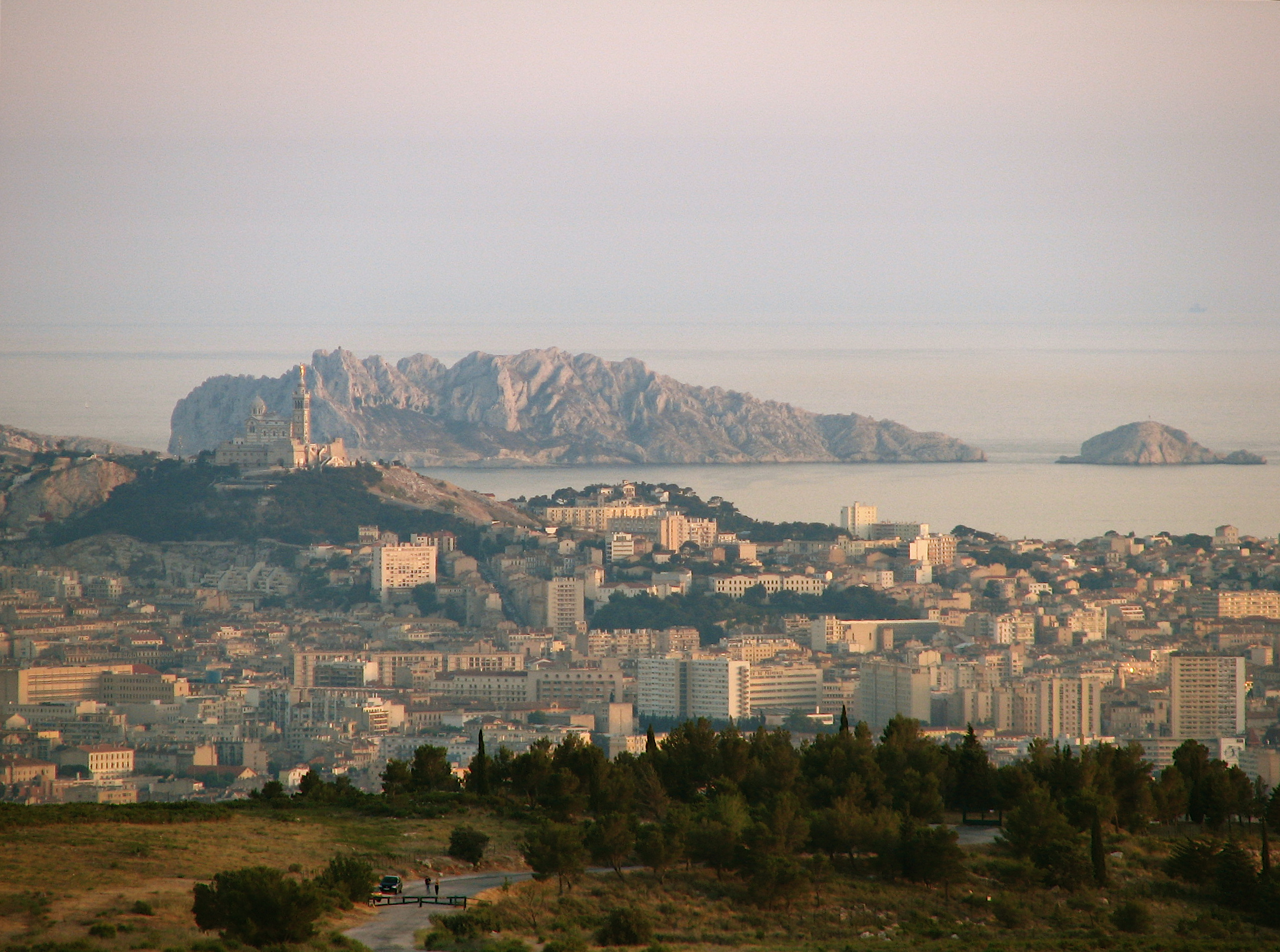 Coucher de soleil sur Notre-Dame de la Garde.